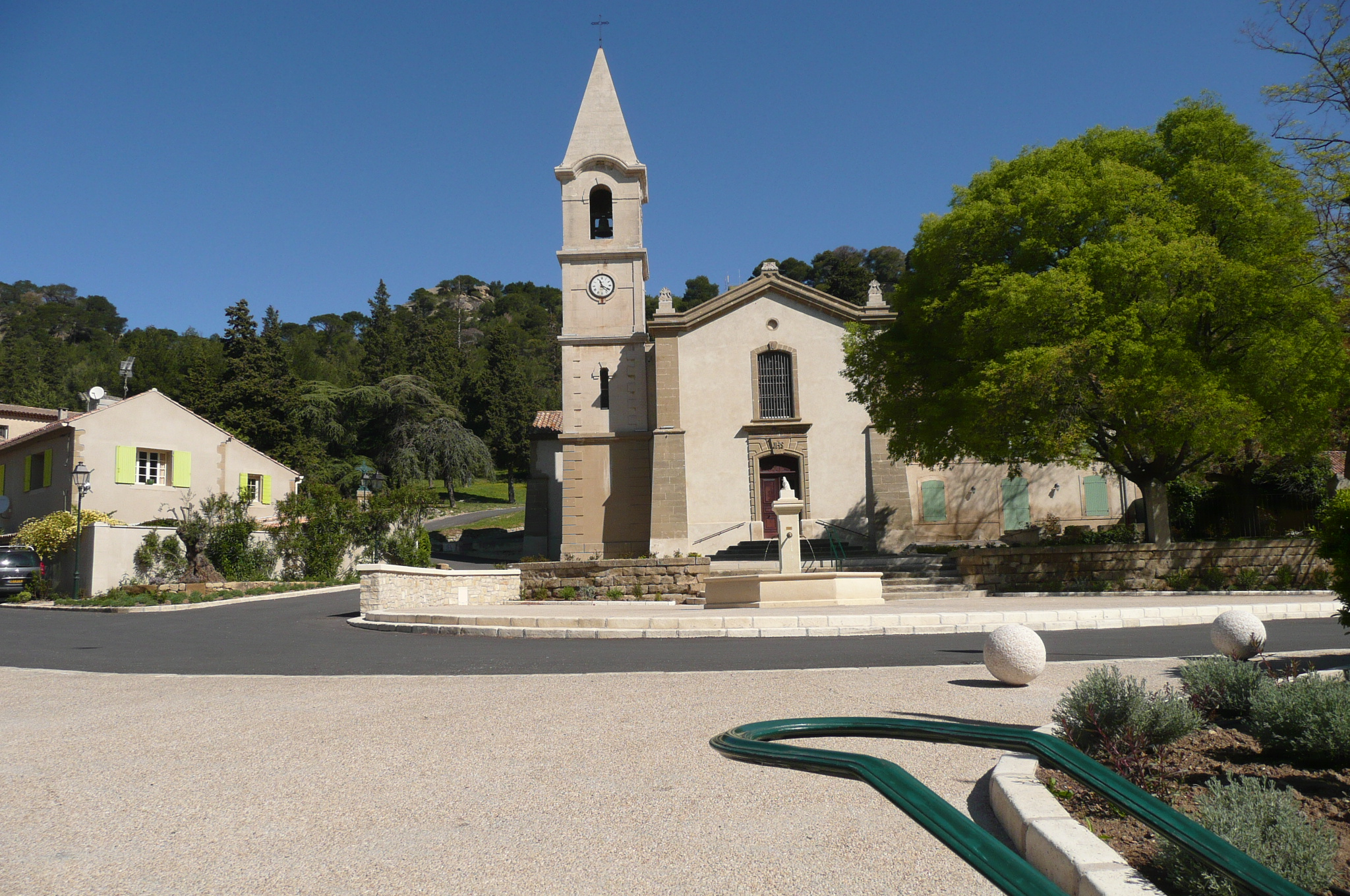 Eglise à Lamanon.